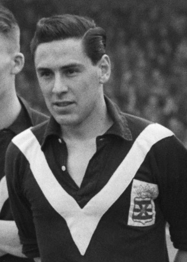 Wim Feldmann.